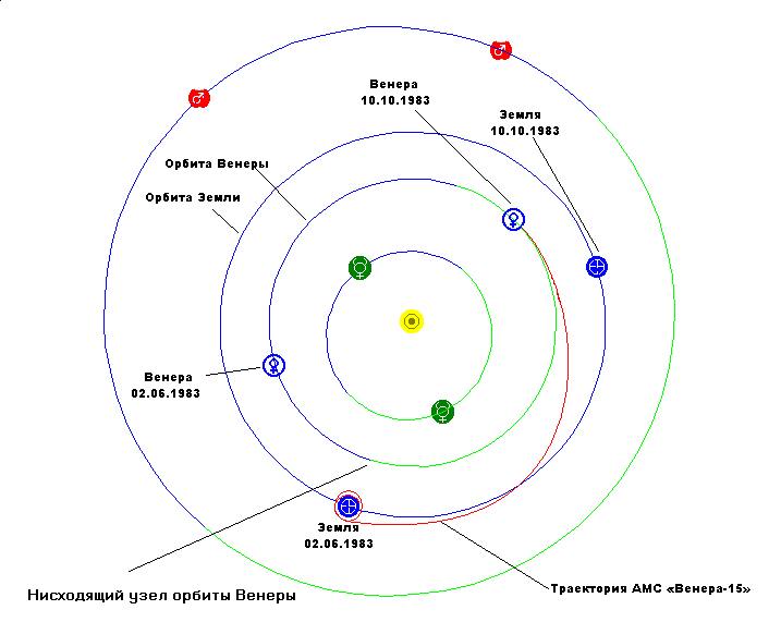 Приблизительная траектория перелета к Венере АМС «Венера-15». Нарисована в MS Paint с использованием изображений расположения планет 2 июня и 10 октября 1983 года из программы Solar System Live, которые согласно описанию на том сайте — Public Domain.